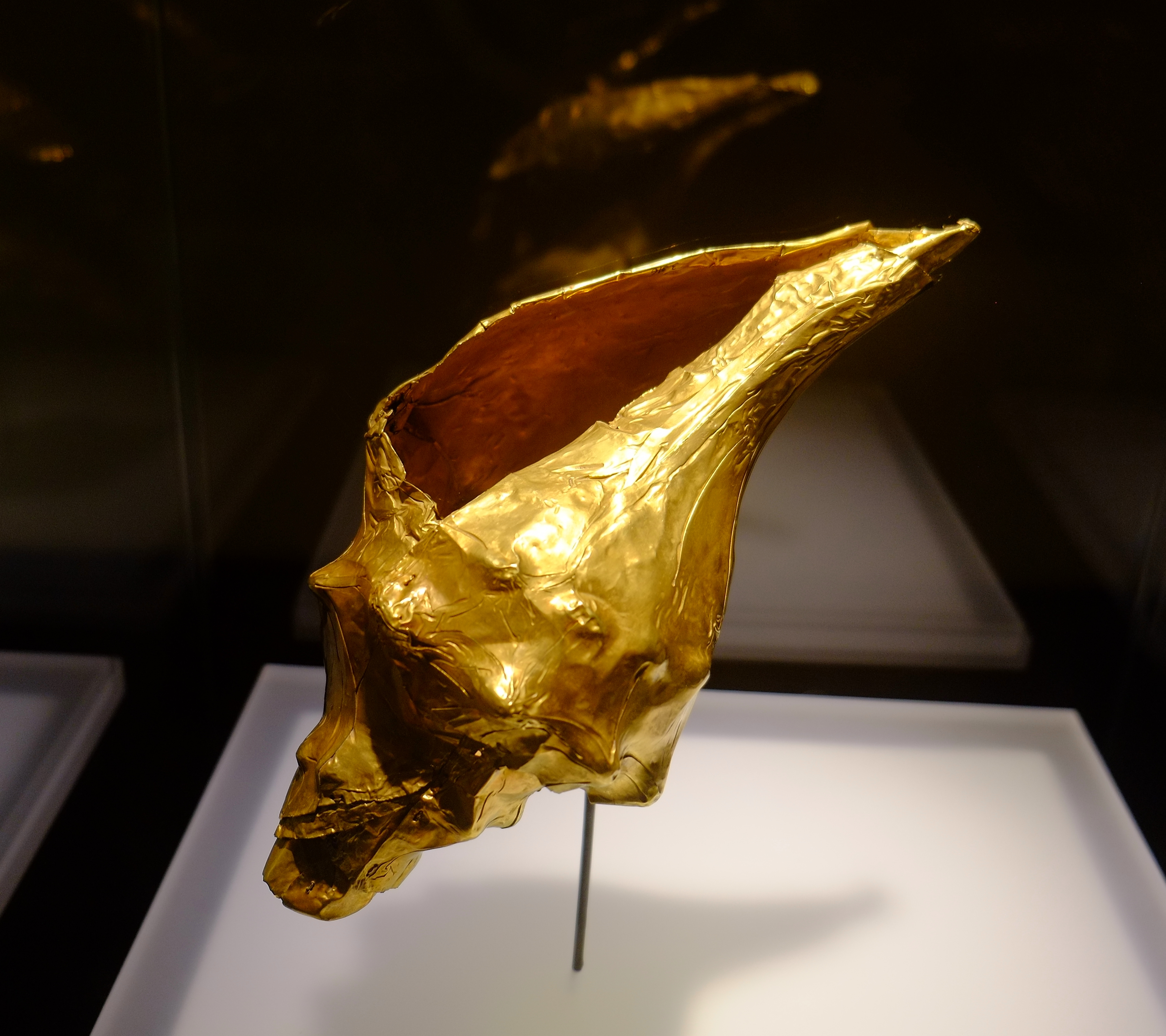 Museo Del Oro, Bogota